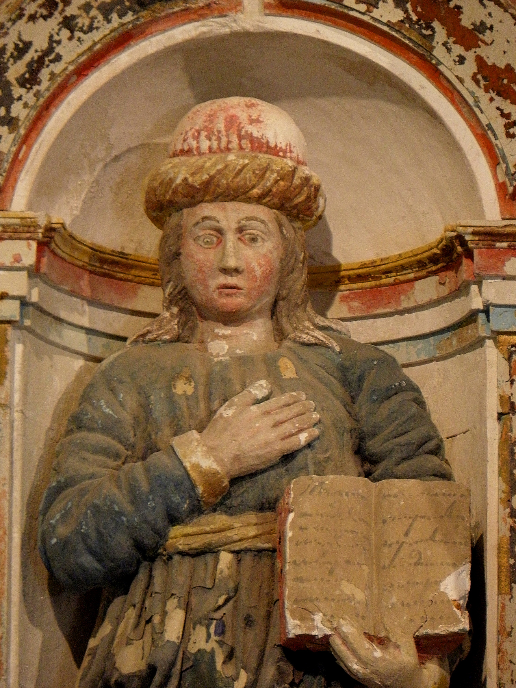 Autel et retable de la Descente de Croix en la chapelle Saint-Nicodème, commune de Pluméliau (56). Saint-Gamaliel. Détail.